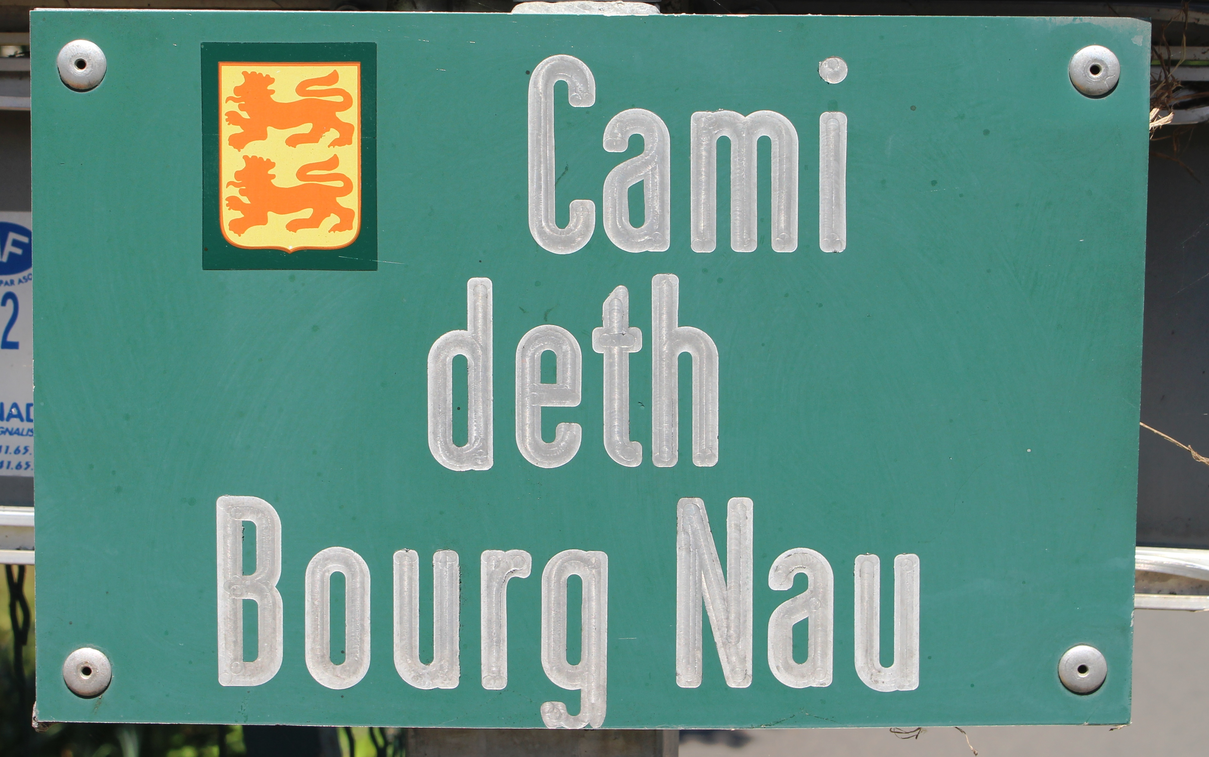 Rue du village de Préchac (Hautes-Pyrénées)